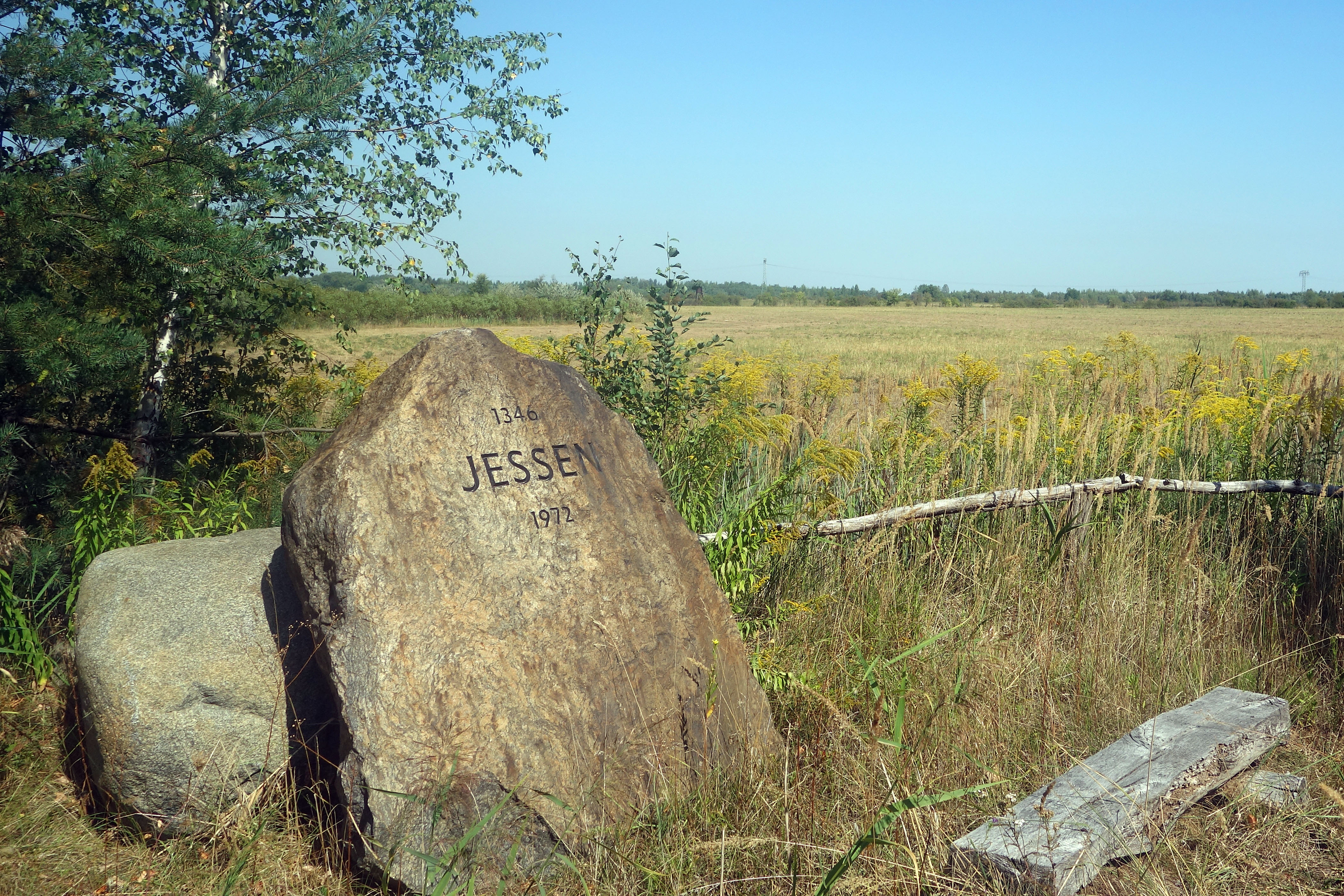 Gedenkstein für den Ort Jessen (bei Spremberg) Standort: Breite 51.553602° Länge 14.289955°